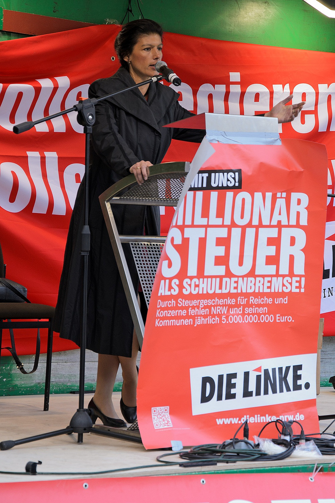 Sahra Wagenknecht, Landtagswahlkampf DIE LINKE in Hamm.